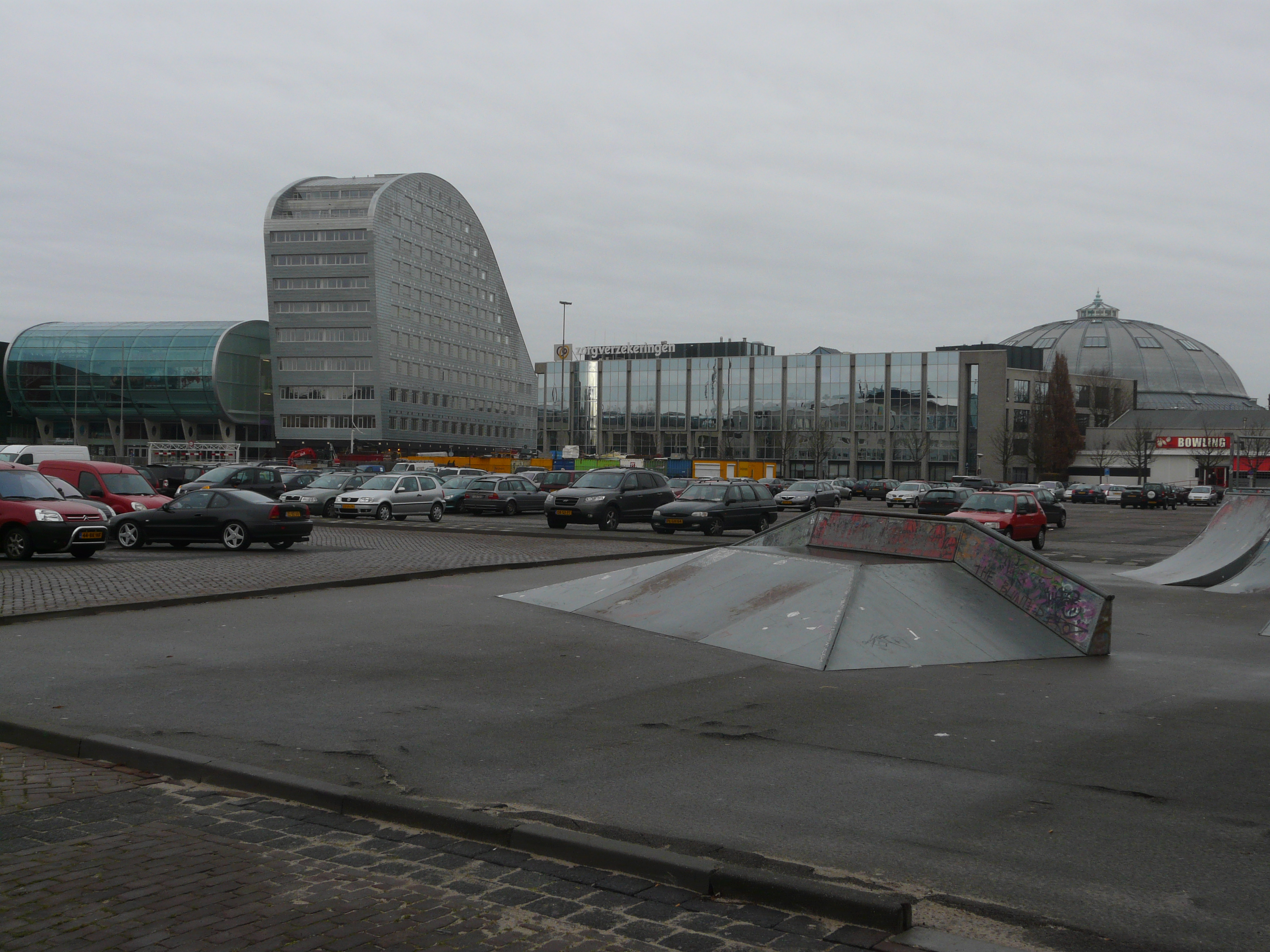 Zicht op een deel van het Chasseveld met de voormalige skatebaan in Breda. Gelegen naast de straat de Claudius Prinsenlaan, Breda. Niet ver het centrum van Breda